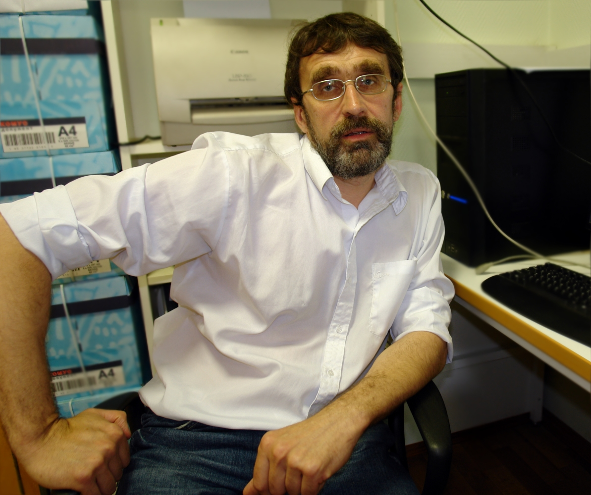 Коллемболог Михаил Борисович Потапов